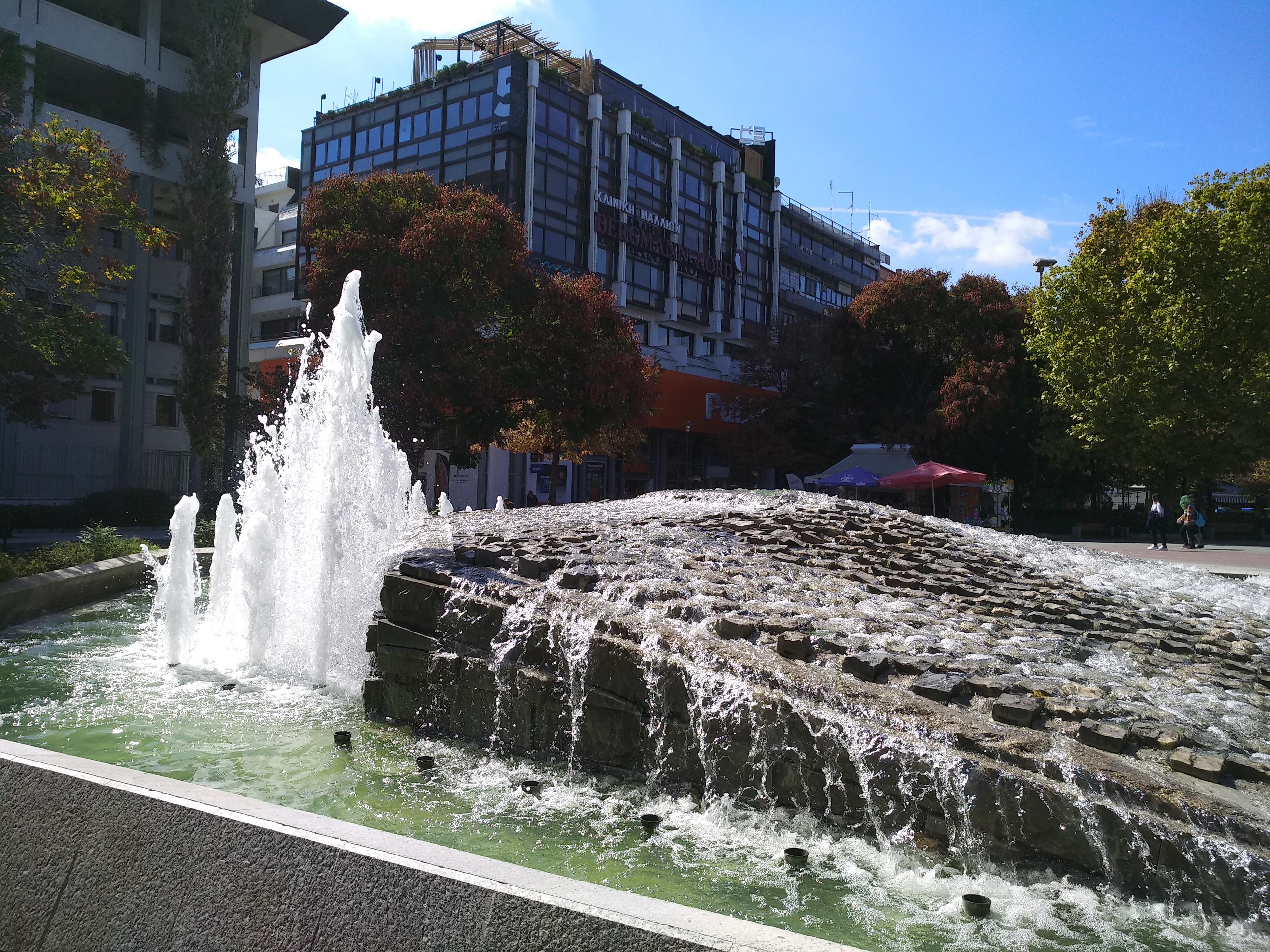 Λάρισα_κεντρικη πλατεία_συντριβανι_1